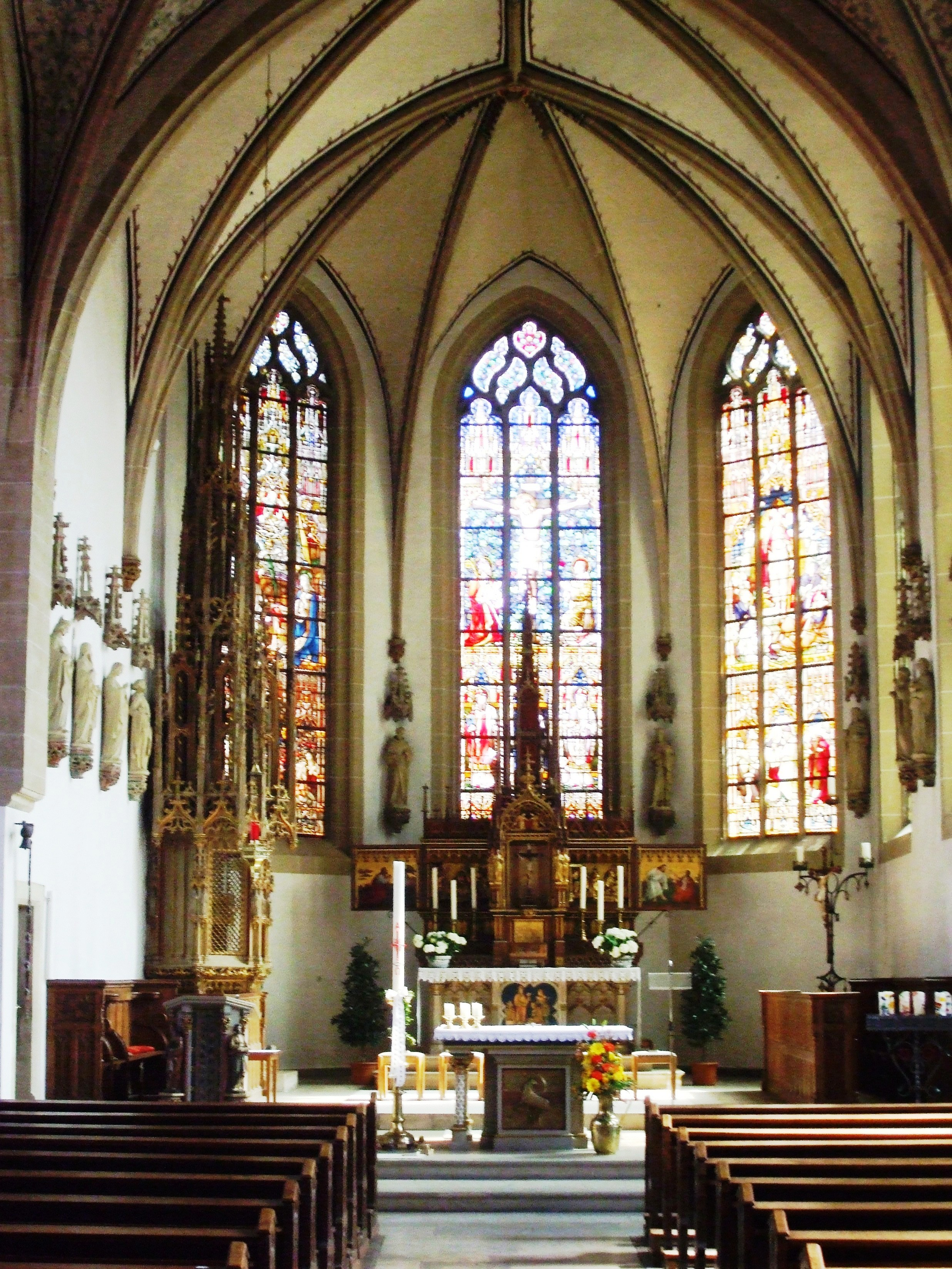 St. Magnus (Everswinkel) - Altarraum